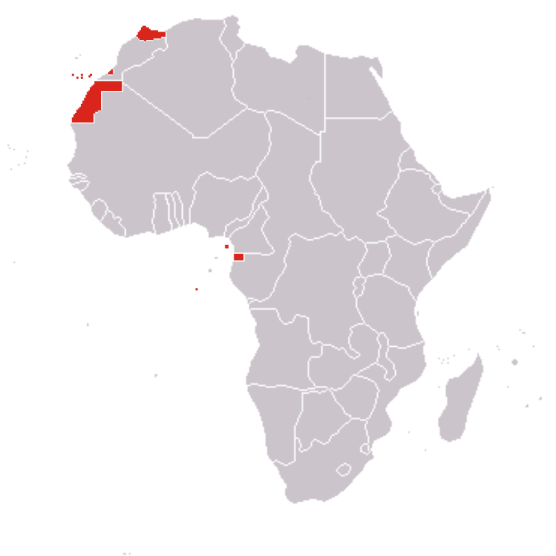 Colonias y territorios de España en África hasta 1956 / Spanish colonies and territories in Africa (1950) Este mapa no es correcto ya que no identifica el territorio de cabo Juby como protectorado español.